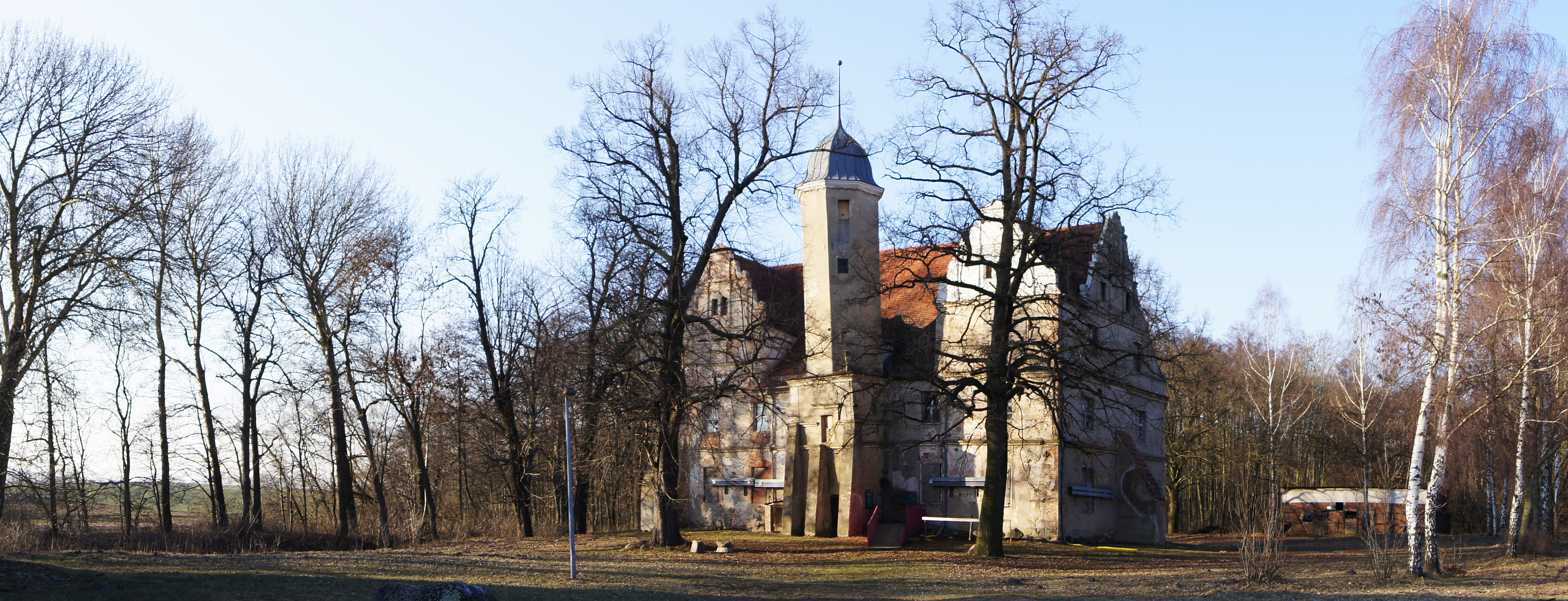 Schloss Quilow Südostseite